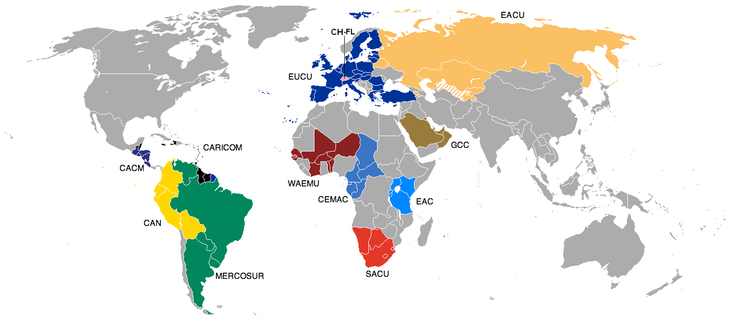 Customs union